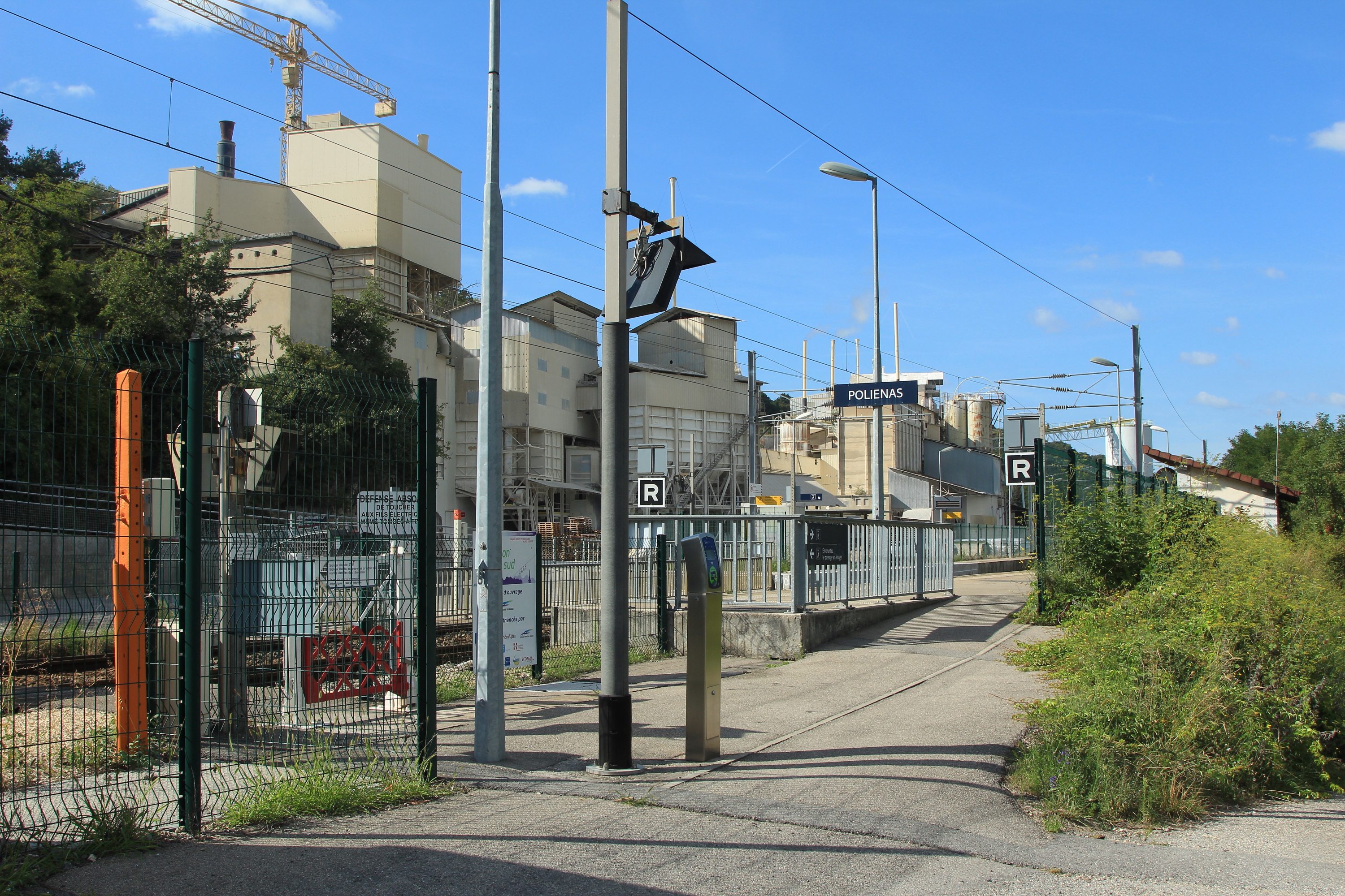 Vue de la halte de Poliénas, au niveau de l'accès.